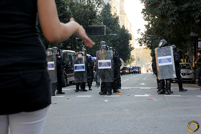 Huelga general del 29 de marzo de 2012 en Barcelona